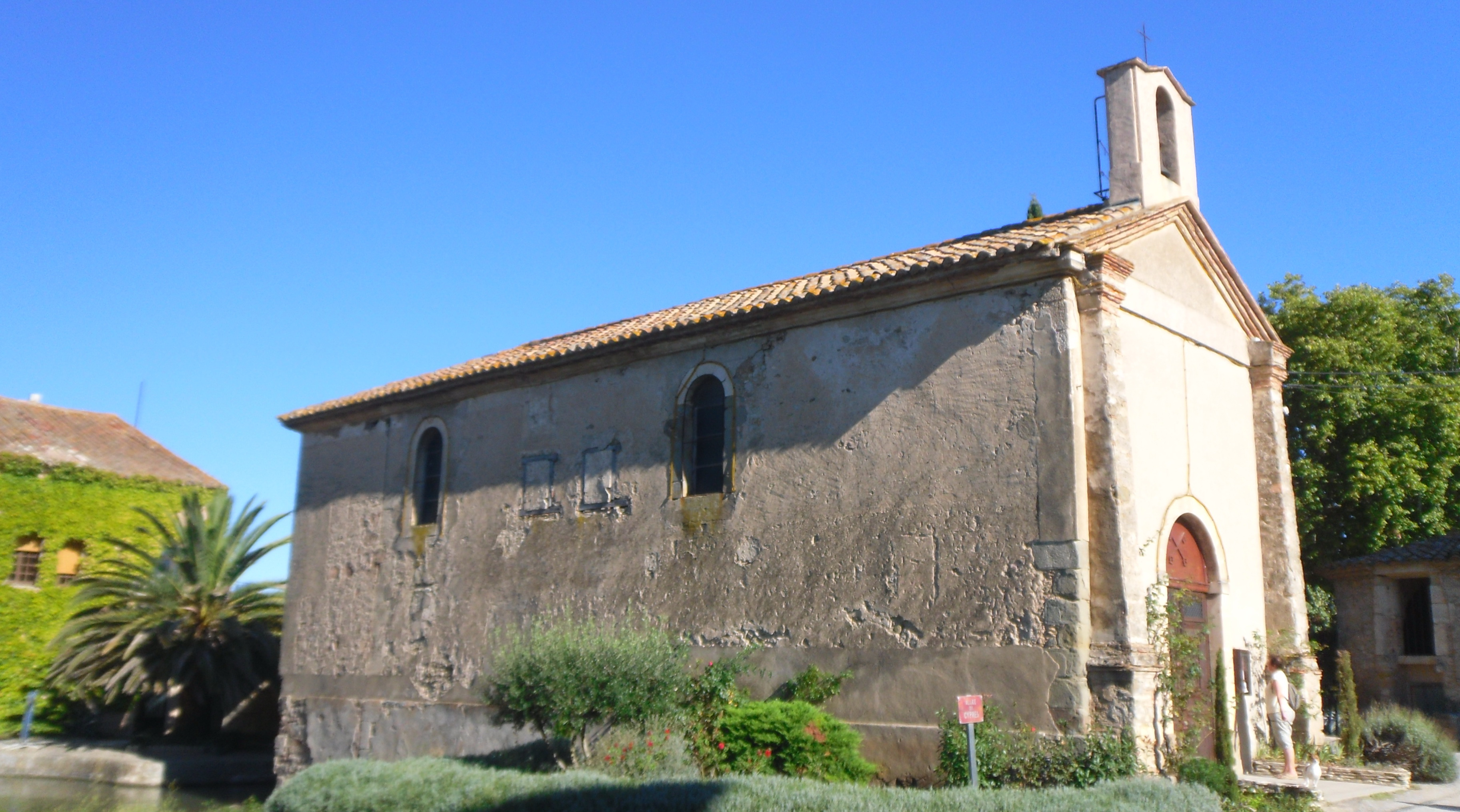 Hameau du Somail (Saint-Nazaire-d'Aude)